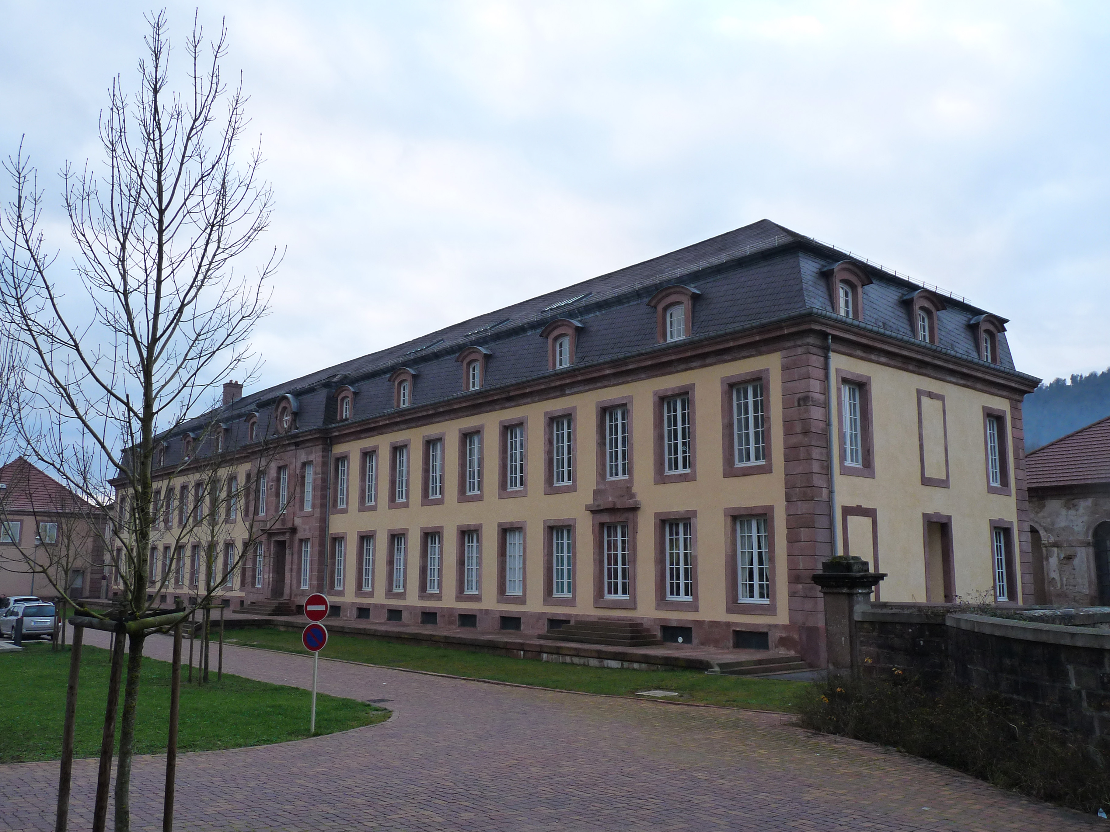 Senones (Vosges) : Second château des princes de Salm